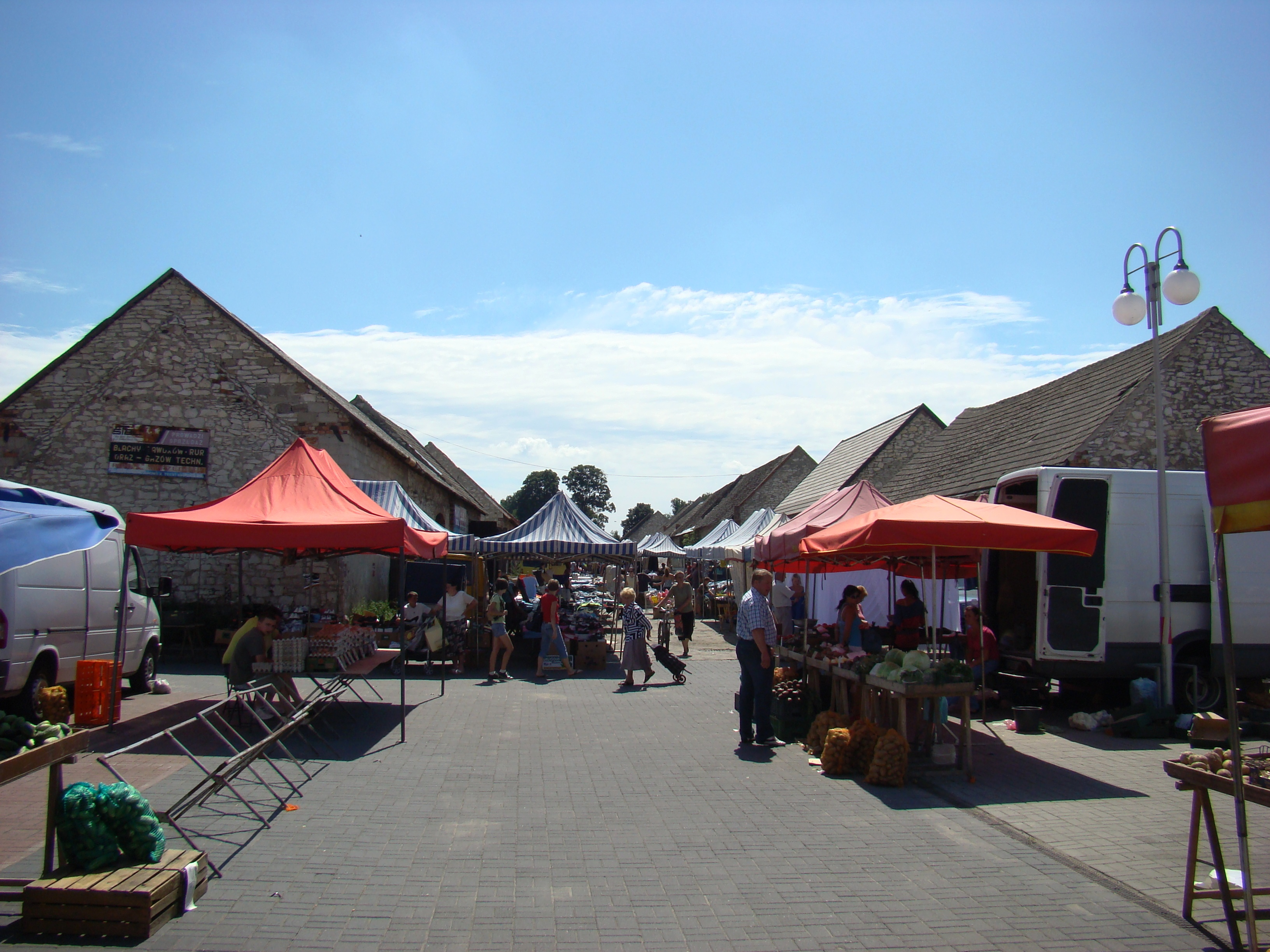 Środowy jarmark przy Żareckich stodołach.